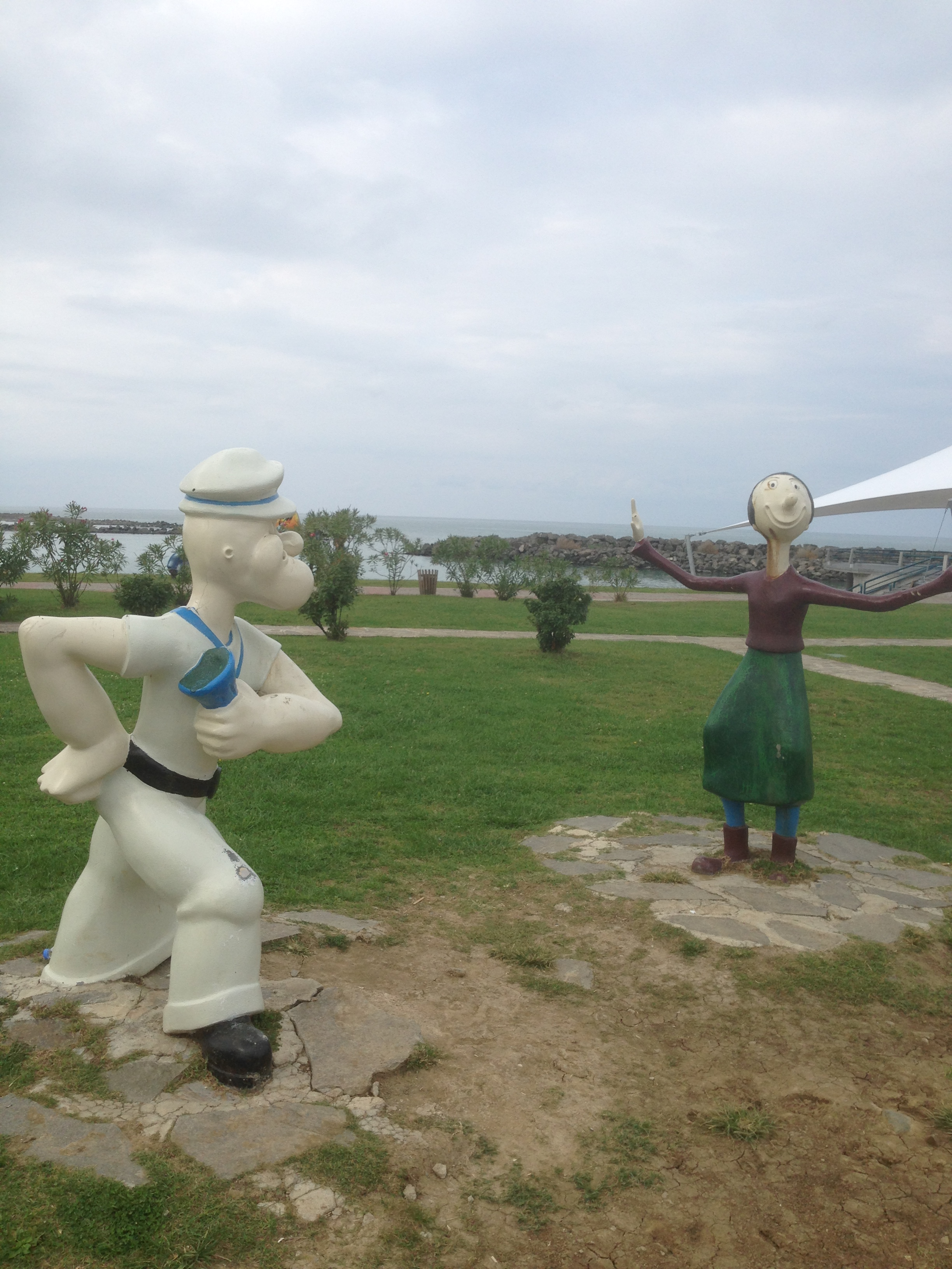 Samsun'dan çeşitli görüntüler